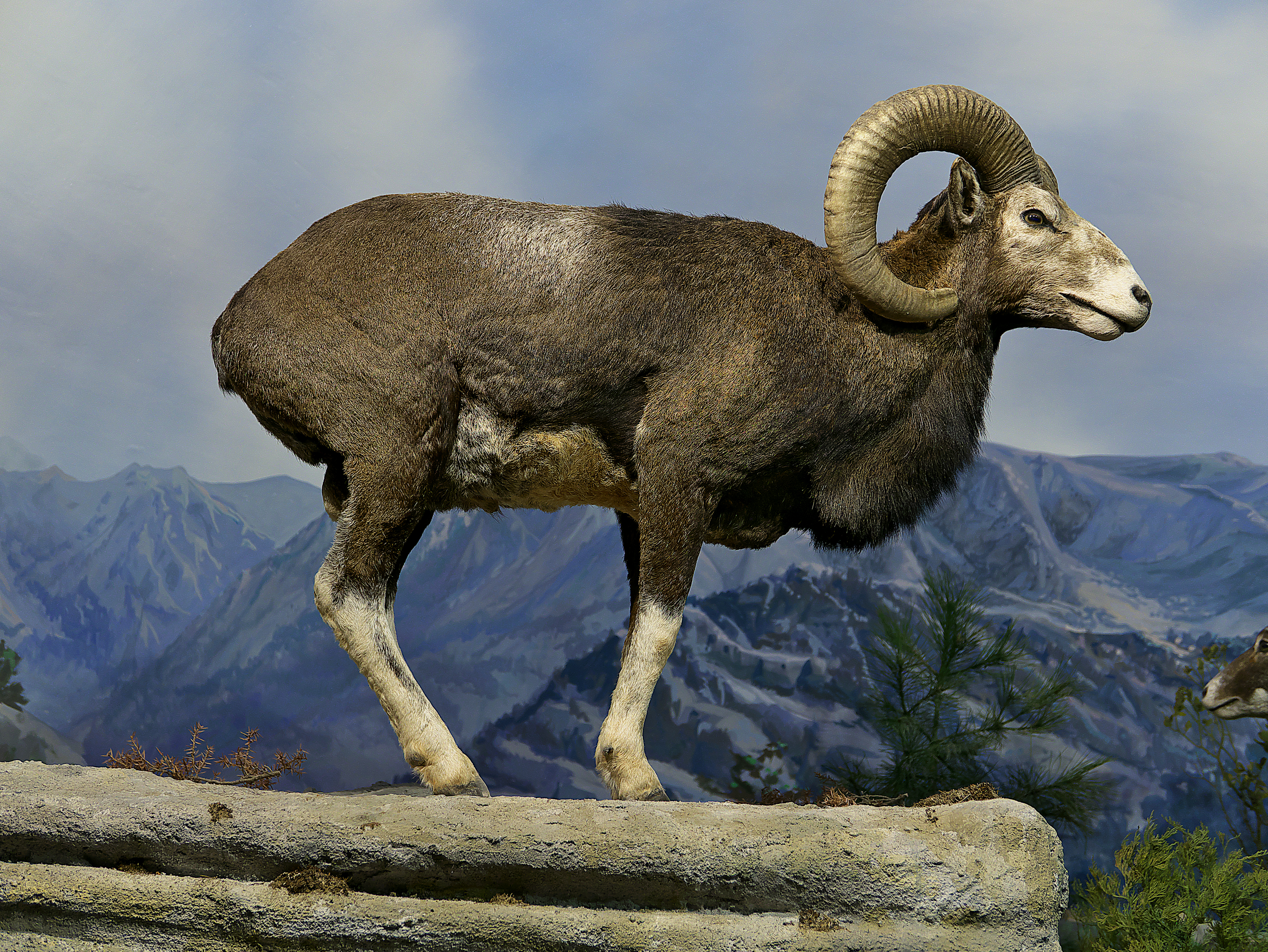 Muflón español.